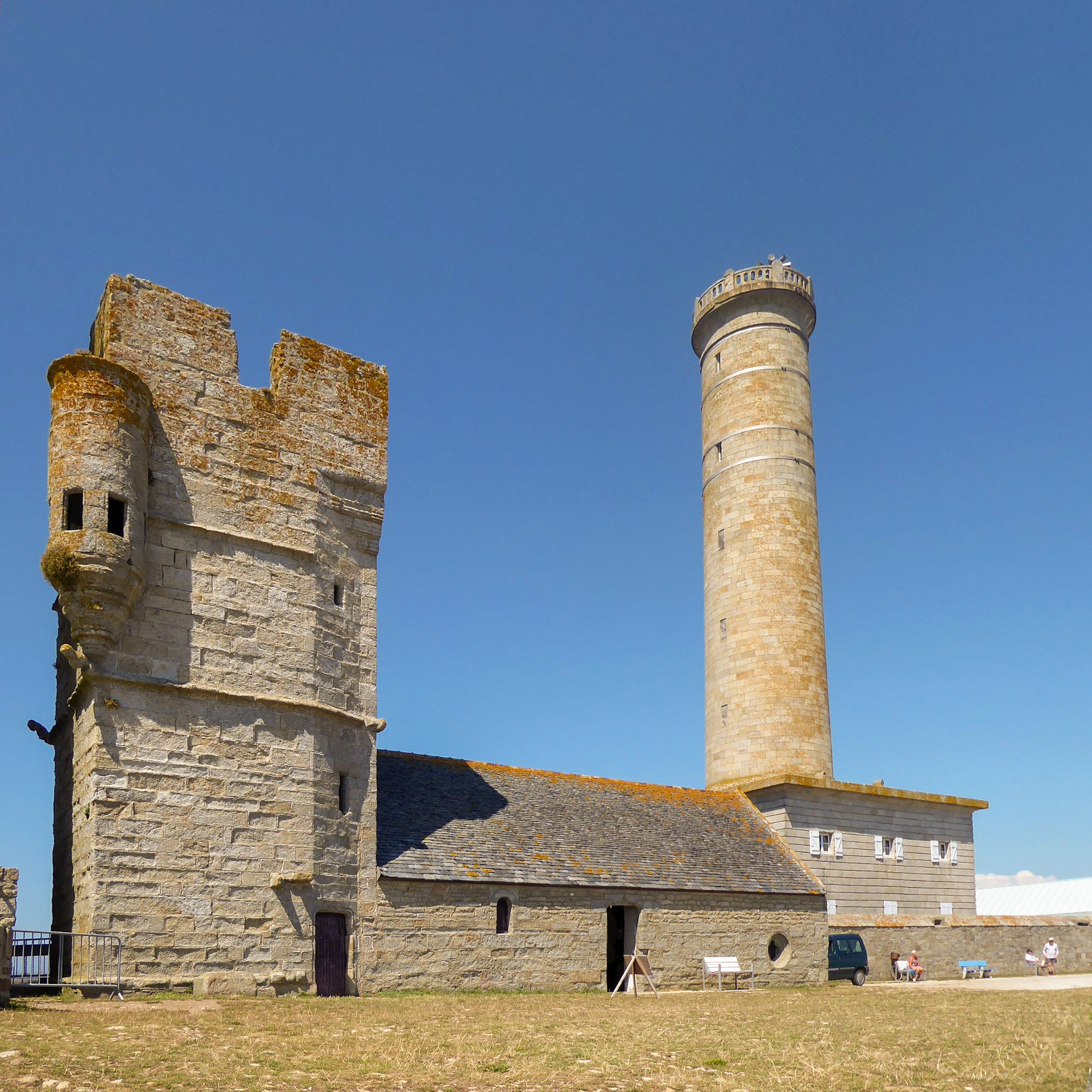 Chapelle Saint-Pierre (Penmarch)